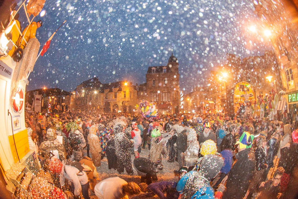 Pluie de confettis à Granville